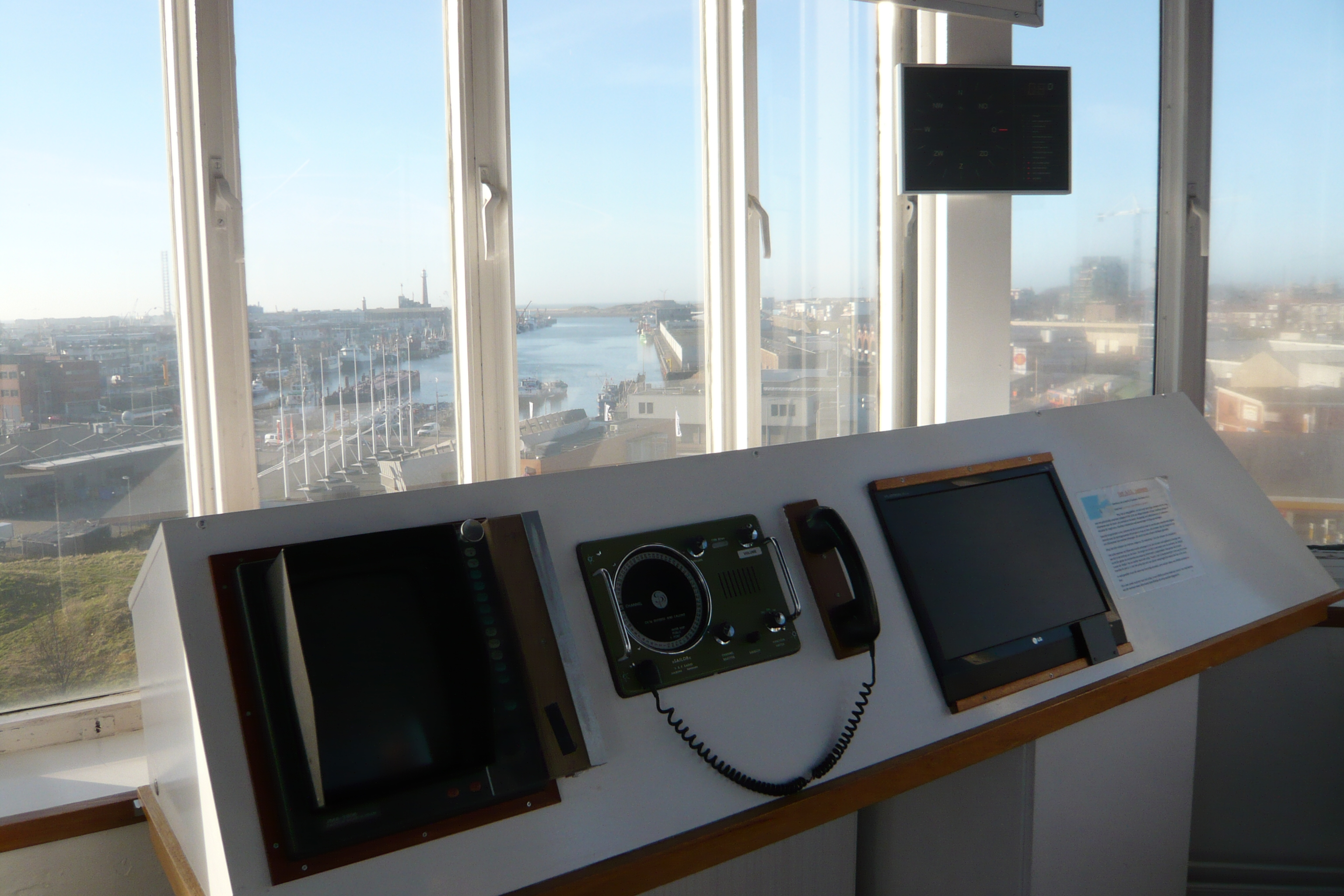 IJmuider Zee- en Havenmuseum 'de Visserijschool', Havenkade 55, IJmuiden Werkend radar installatie met uitzicht over de Vissershaven